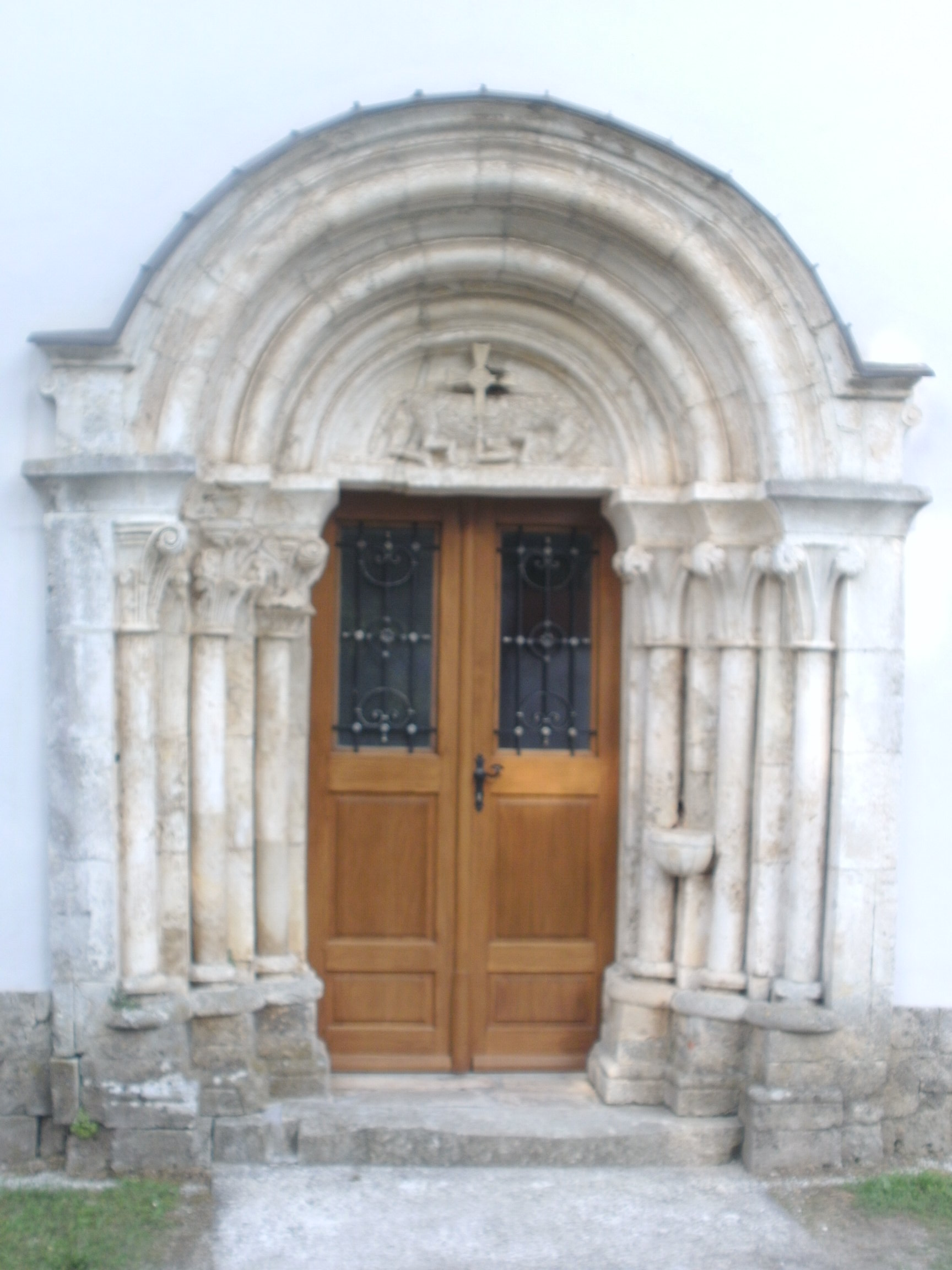 Romanski portal z luneto z jagnjetom cerkve v Špitaliču, nekdanje Ecclesie Minor (cerkve laičnih bratov) v Špitaliču pri Slovenskih Konjicah